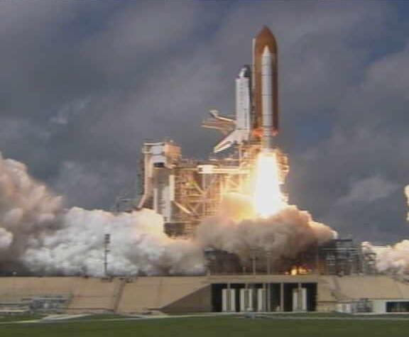 STS-115 launches